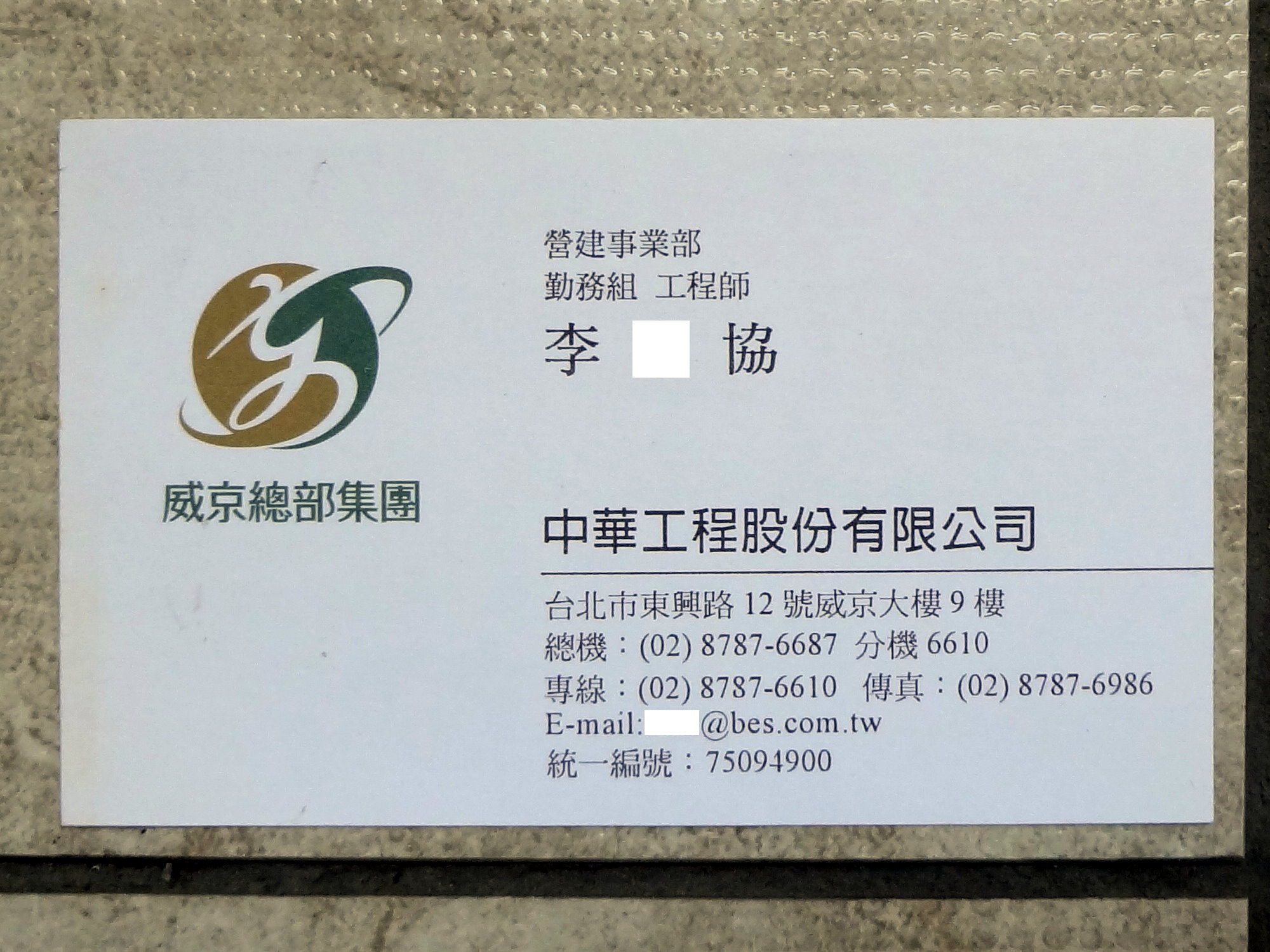 中華工程員工名片正面。